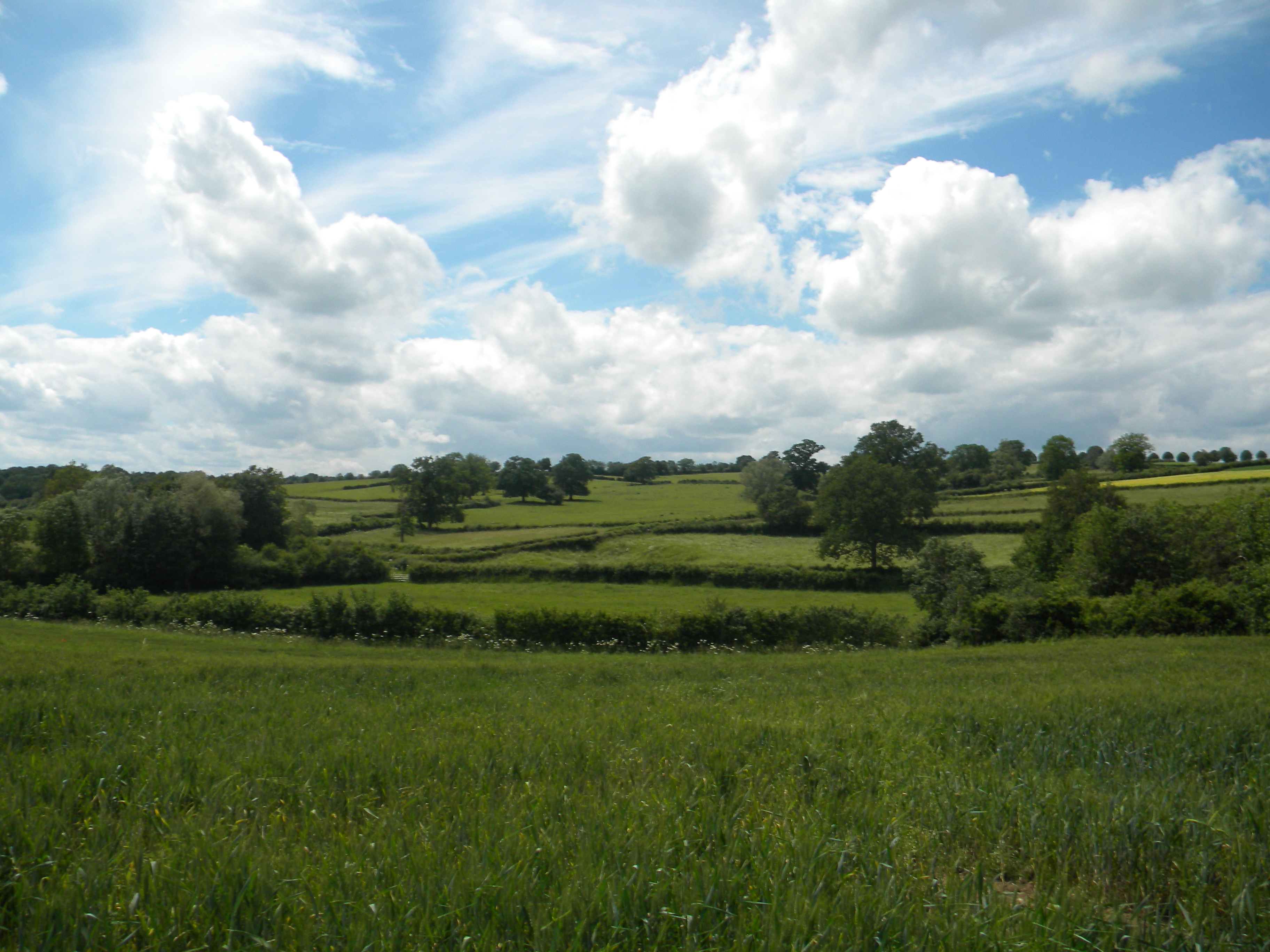 Paysage hameau de Pochey commune de Jouey